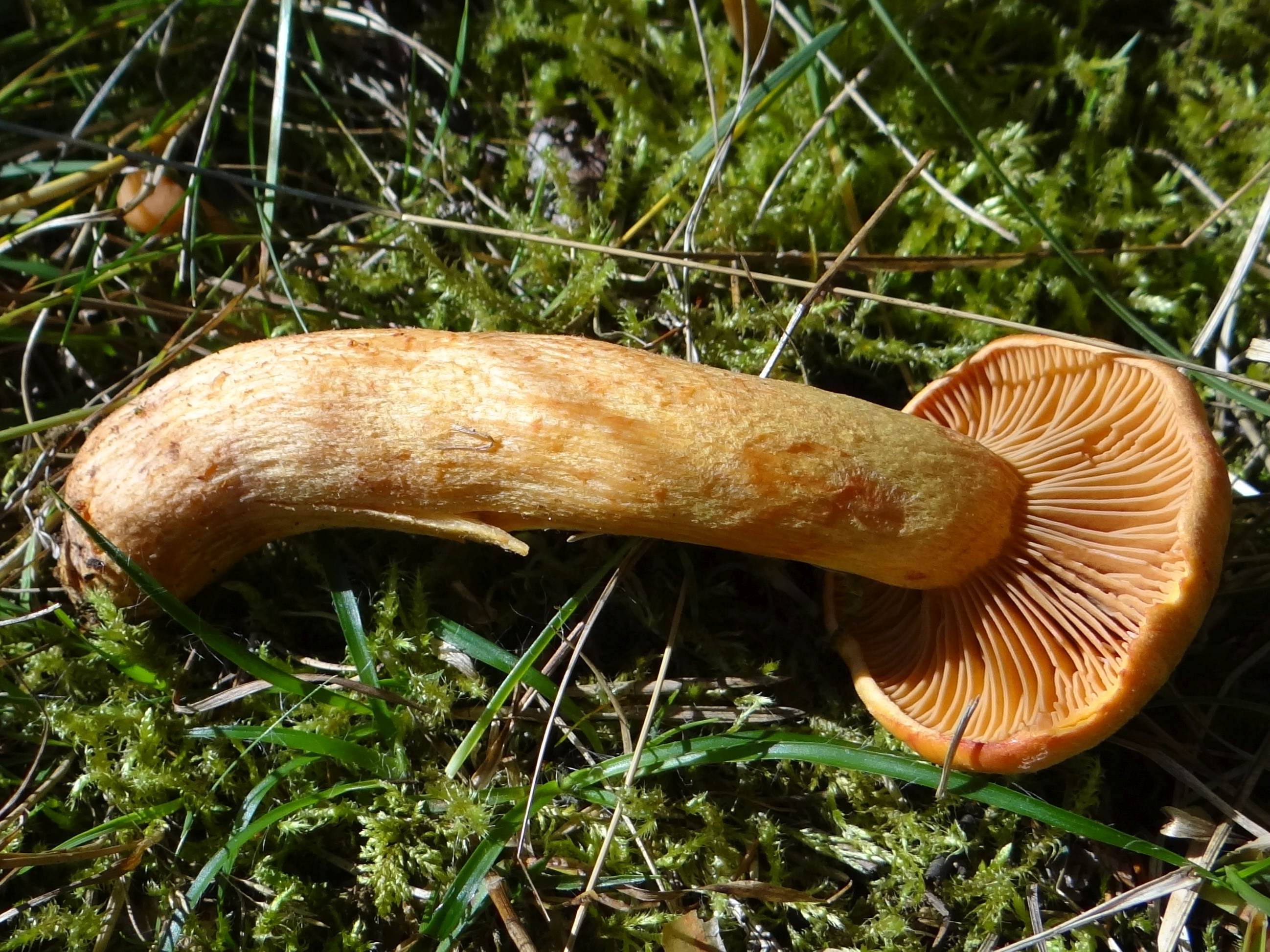 Chroogomphus helveticus (location: Slovakia, Nízke Tatry, Sedlo pod Skalkou)